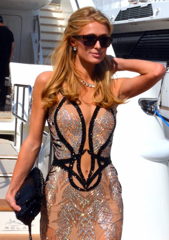 Paris Hilton au festival de Cannes